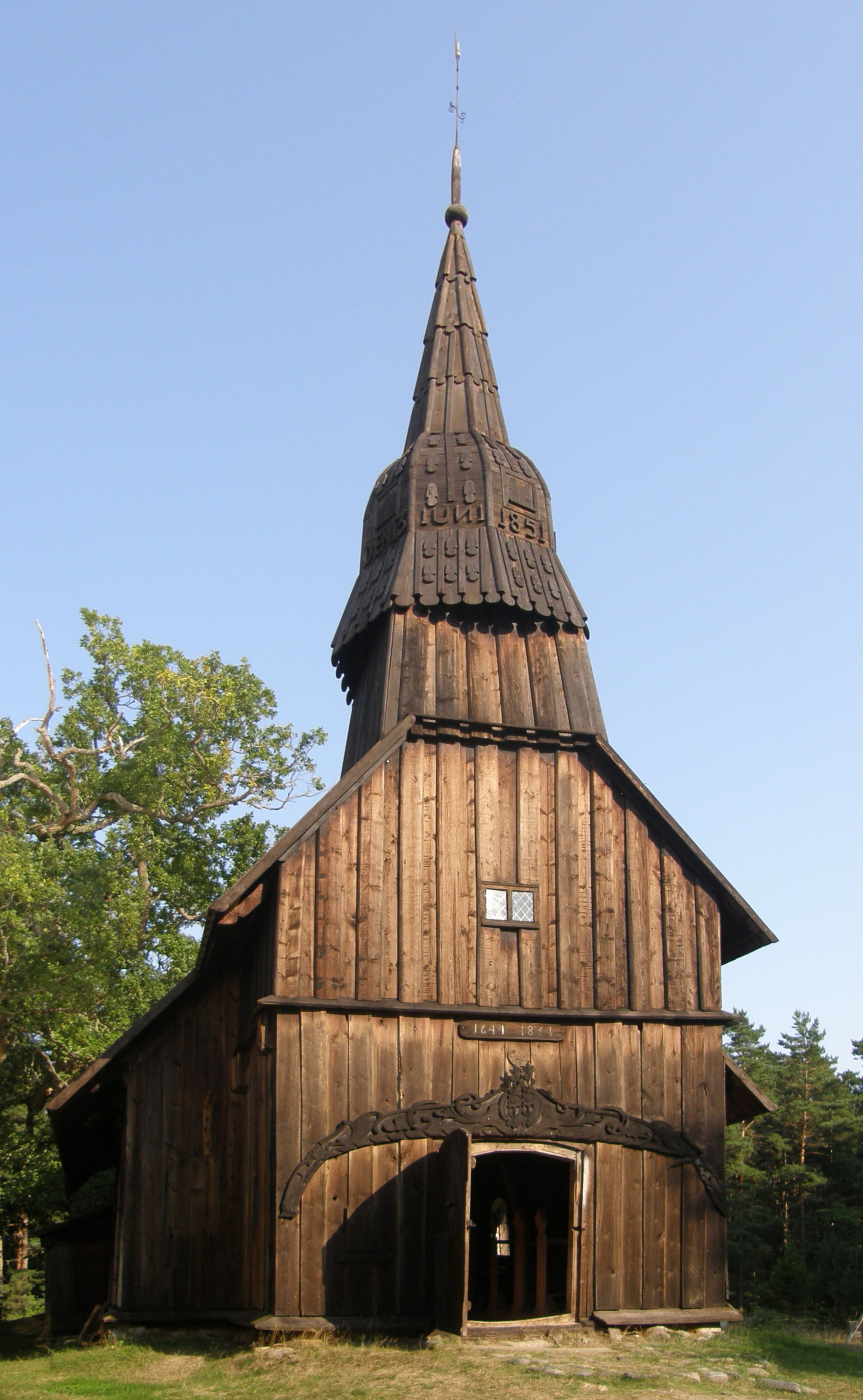 Ruhnu vana puukirik